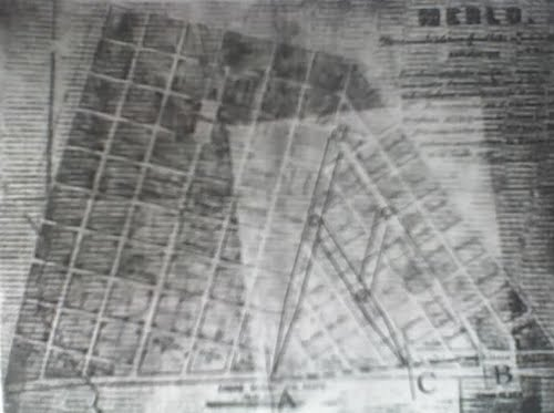 Mapa delpueblo de Merlo en 1870